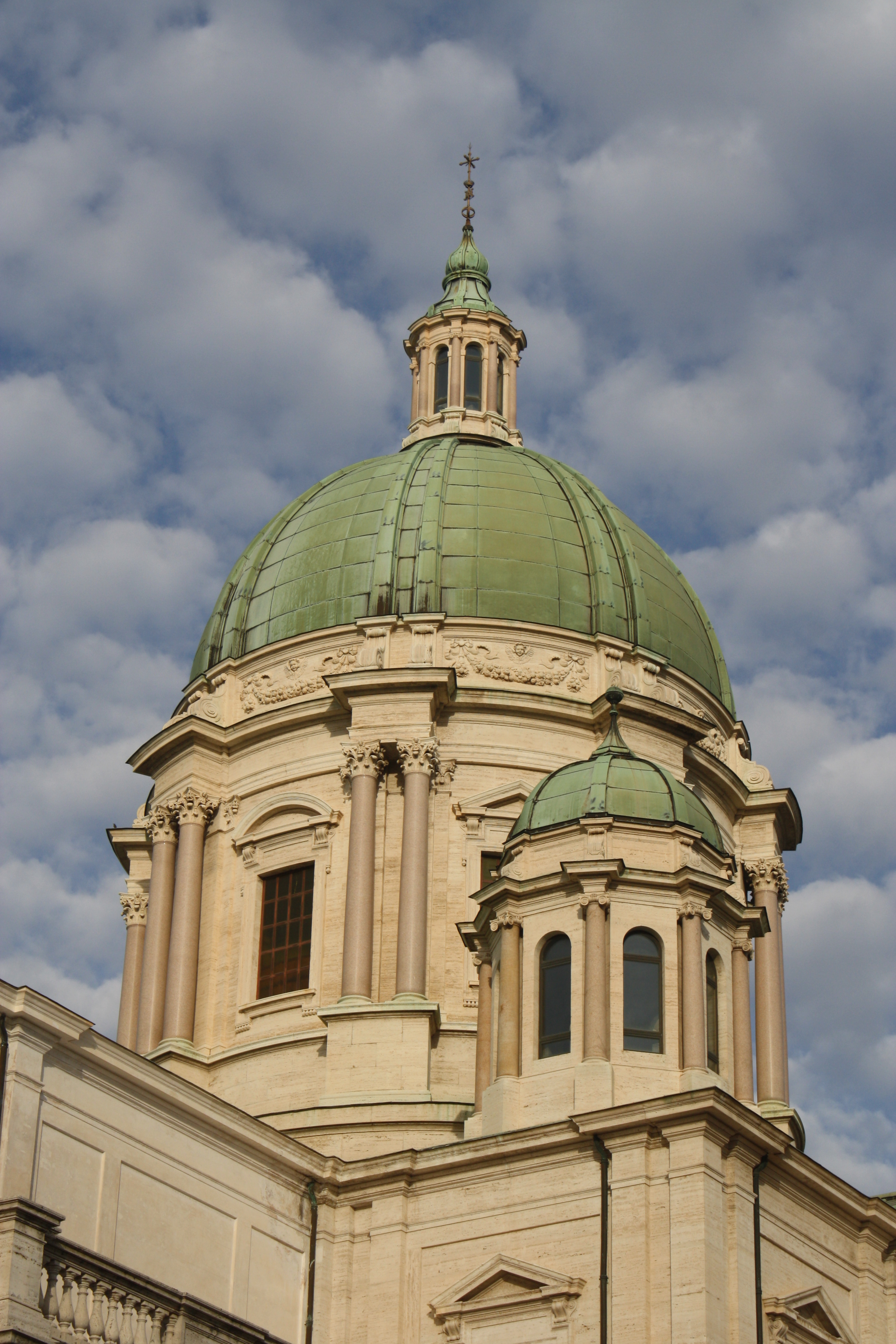 Cupola del santuario della Beata Vergine del Rosario di Pompei.